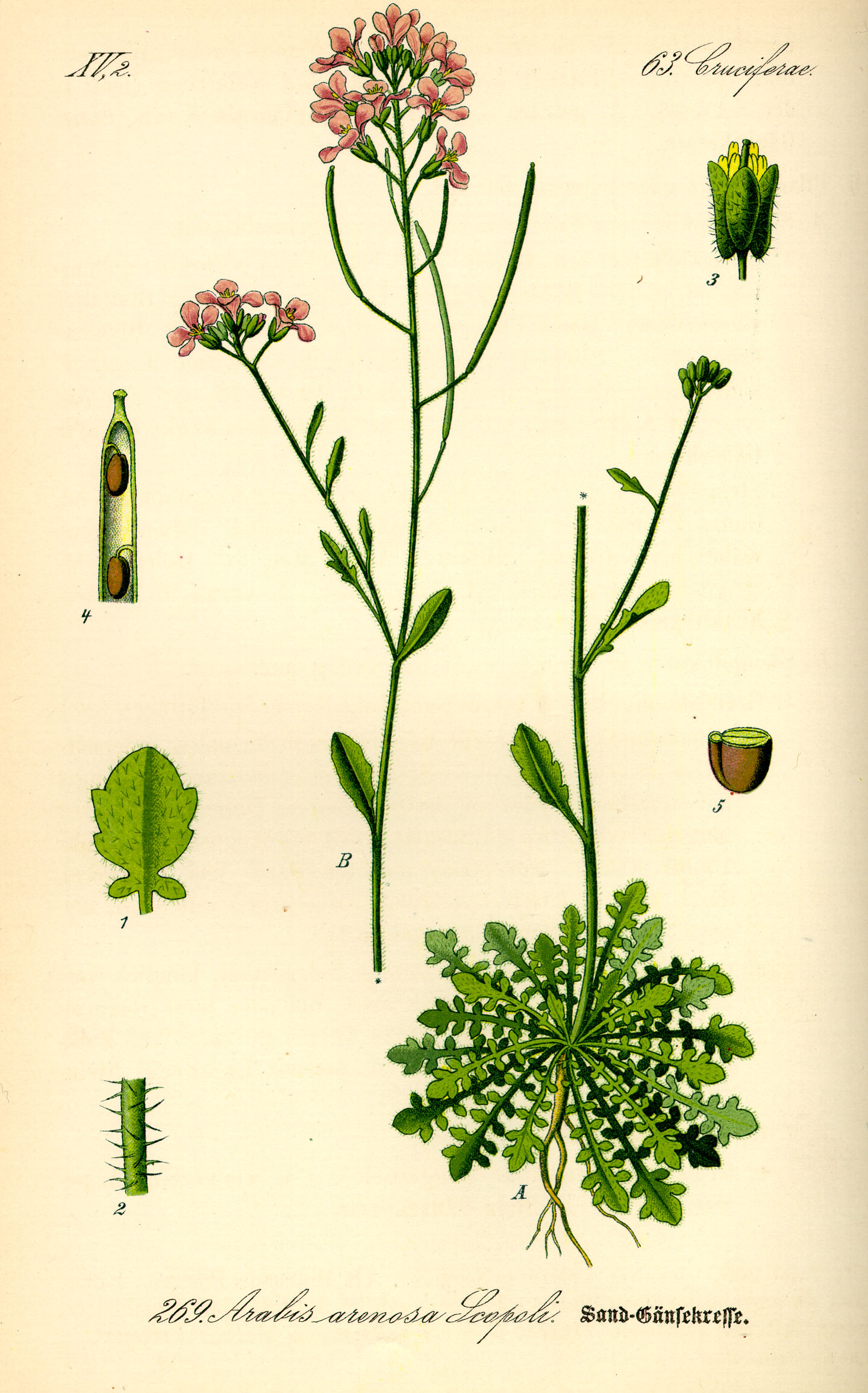 Arabidopsis arenosa (Cardaminopsis arenosa) in Flora von Deutschland, Österreich und der Schweiz